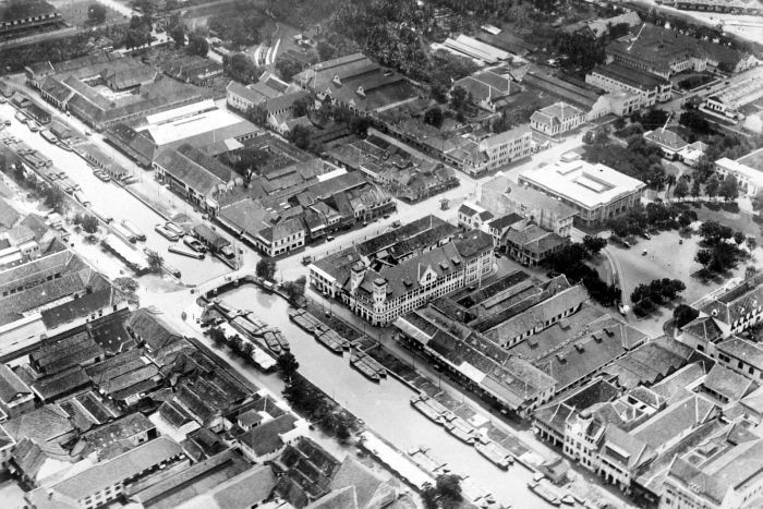 Repronegatief. Batavia, Kali Besar